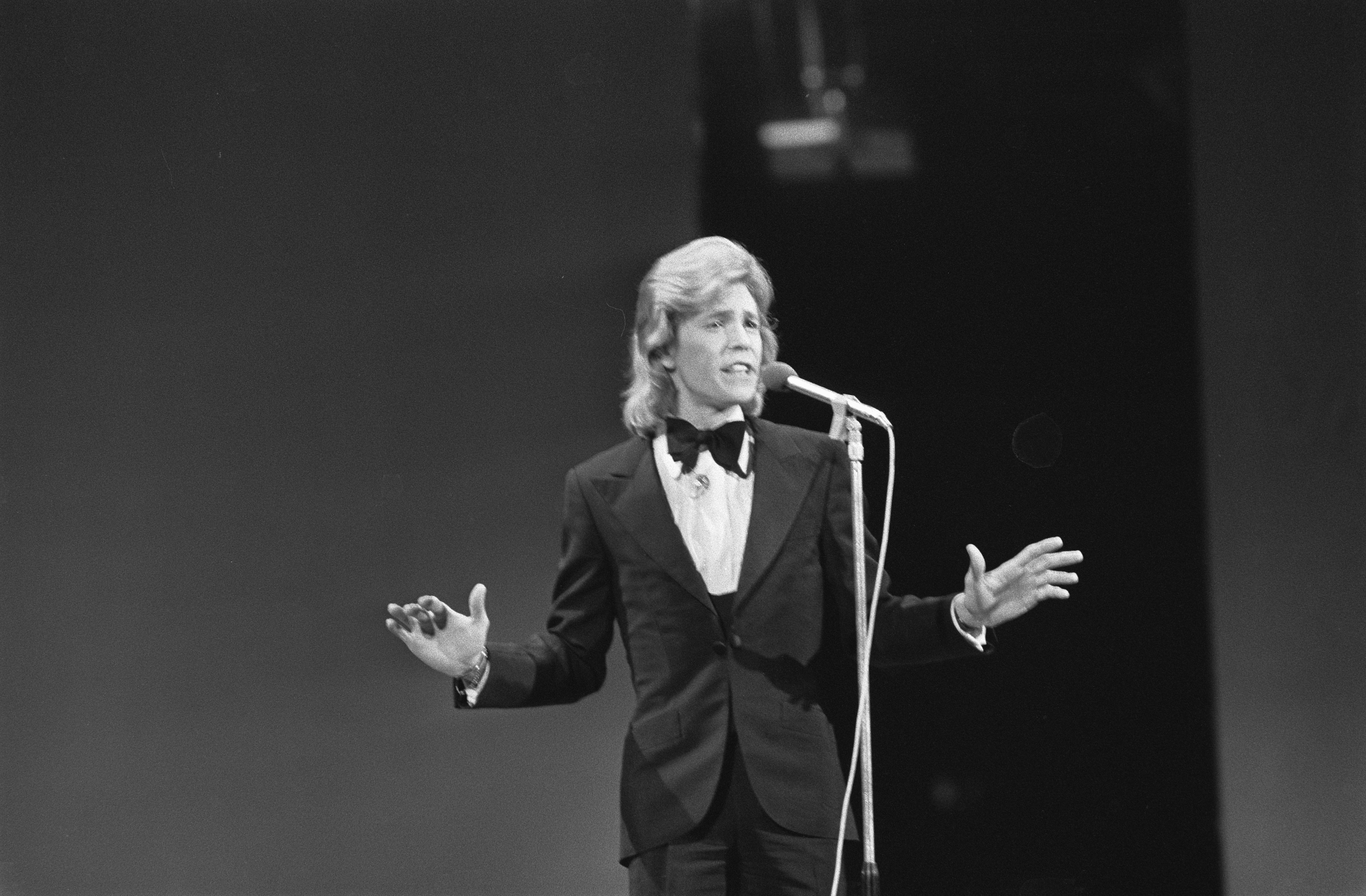 Collectie / Archief : Fotocollectie Anefo Reportage / Serie : Grand Gala du Disque in de RAI Beschrijving : Jurgen Marcus Datum : 17 februari 1974 Locatie : Amsterdam, Noord-Holland Trefwoorden : festivals, zangers Persoonsnaam : Marcus, Jurgen Instellingsnaam : RAI Fotograaf : Fotograaf Onbekend / Anefo Auteursrechthebbende : Nationaal Archief Materiaalsoort : Negatief (zwart/wit) Nummer archiefinventaris : bekijk toegang 2.24.01.05 Bestanddeelnummer : 927-0096